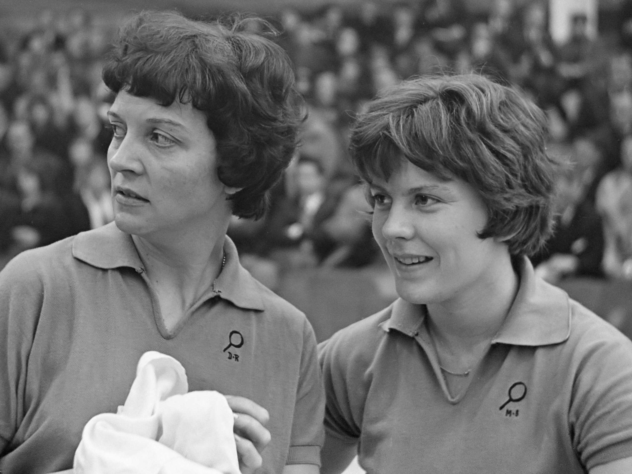 Tafeltenniskampioenschappen in Utrecht. Internationaal toernooi nummer 14 Diana Rowe en mejuffrouw Shannon (15+16) 6 oktober 1963